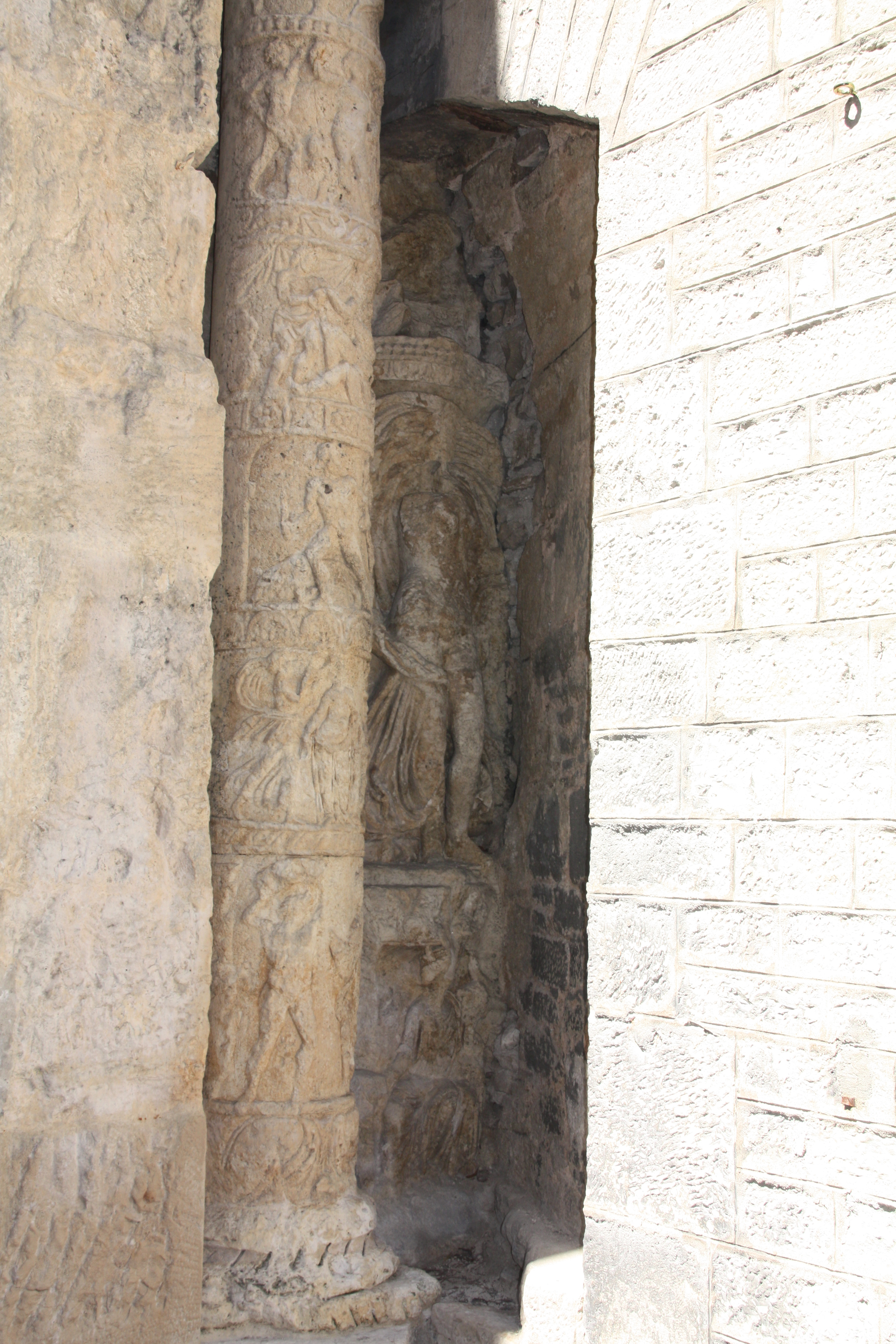 Porte Noire à Besançon.